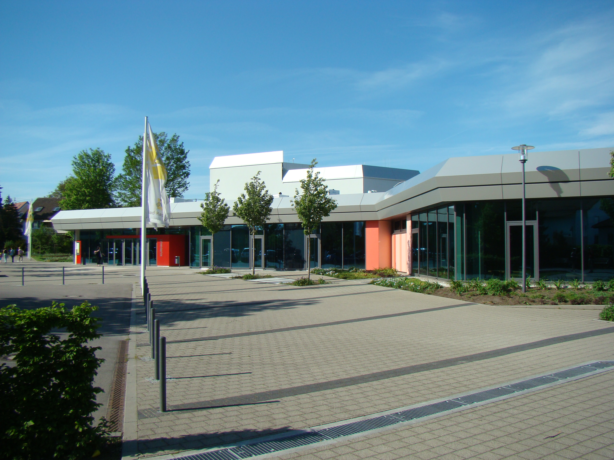 Kurhaus in Bad Rappenau (Fassadengestaltung seit Sanierung von 2011)